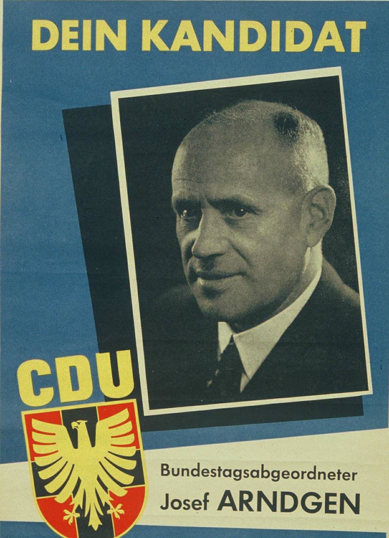 Dein Kandidat Bundestagsabgeordneter ...Abbildung:PorträtfotoPlakatart:Kandidaten-/Personenplakat mit PorträtObjekt-Signatur:10-001: 485Bestand:Plakate zu Bundestagswahlen (10-001)GliederungBestand10-18:Plakate zu Bundestagswahlen (10-001) » Die 2. Bundestagswahl am 6. September 1953 » CDU » Mit PorträtfotoLizenz:KAS/ACDP 10-001: 485 CC-BY-SA 3.0 DE